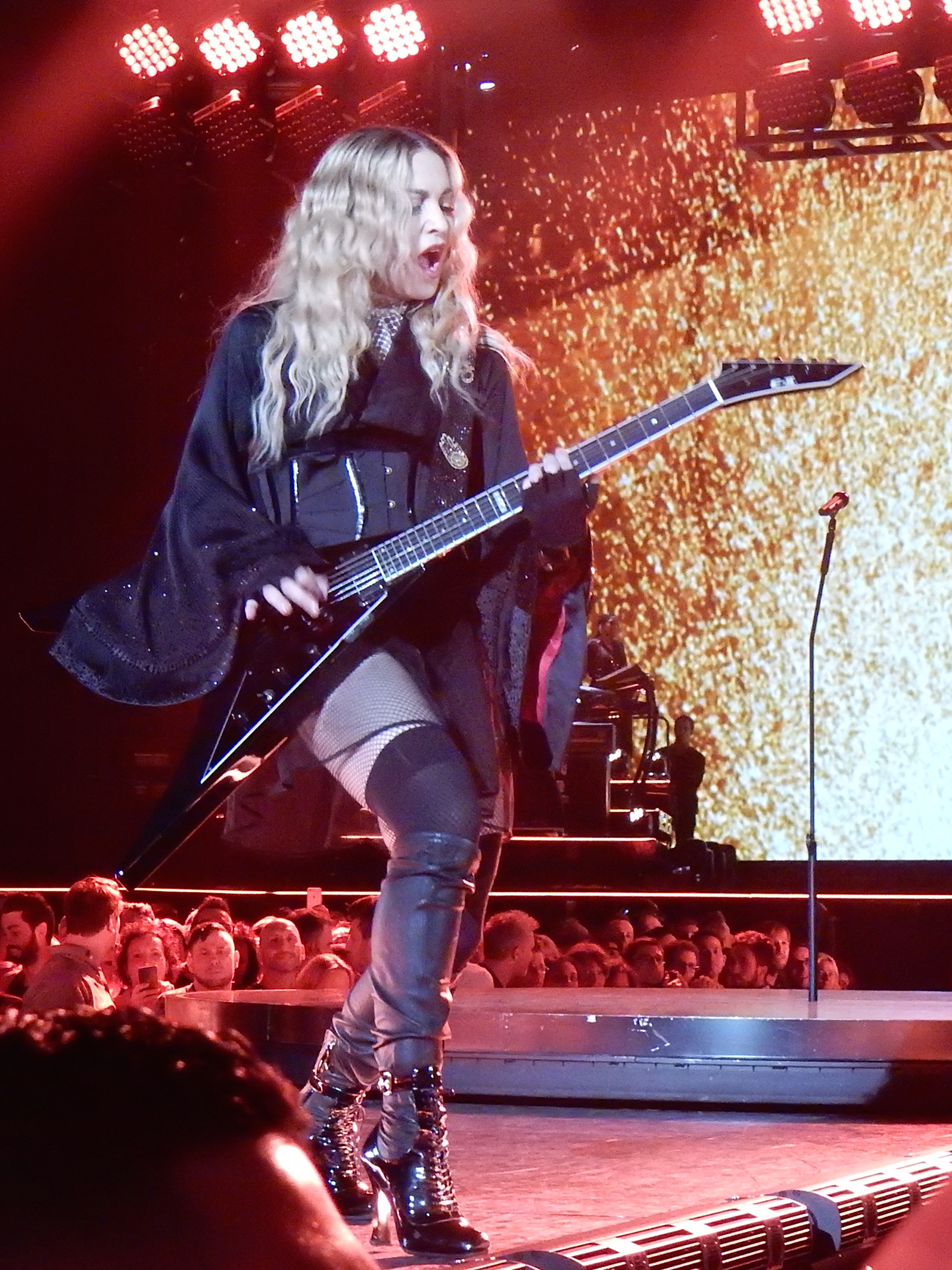 Madonna - Rebel Heart Tour Cologne 2